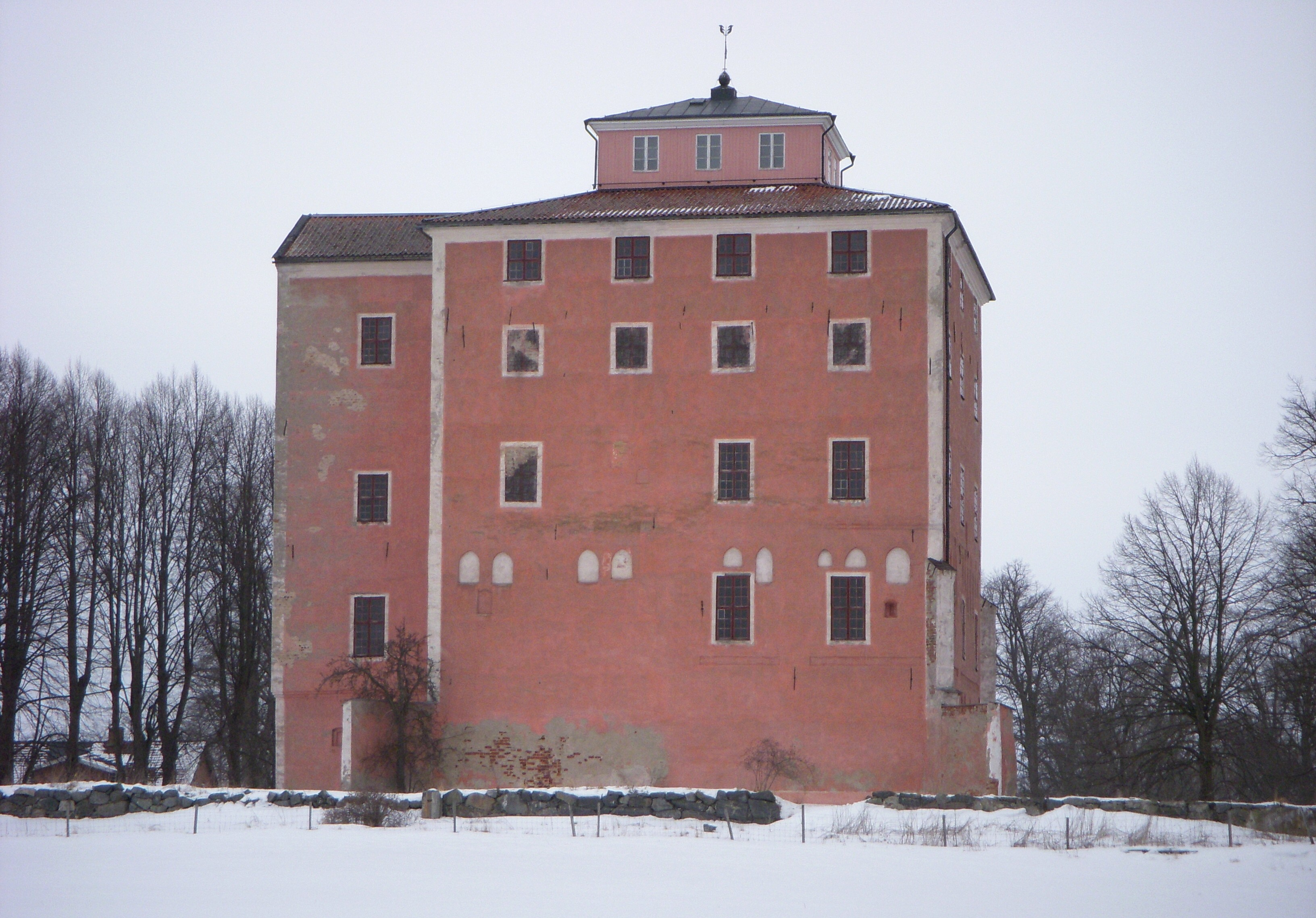 Tynnelsö slott i Strängnäs kommun